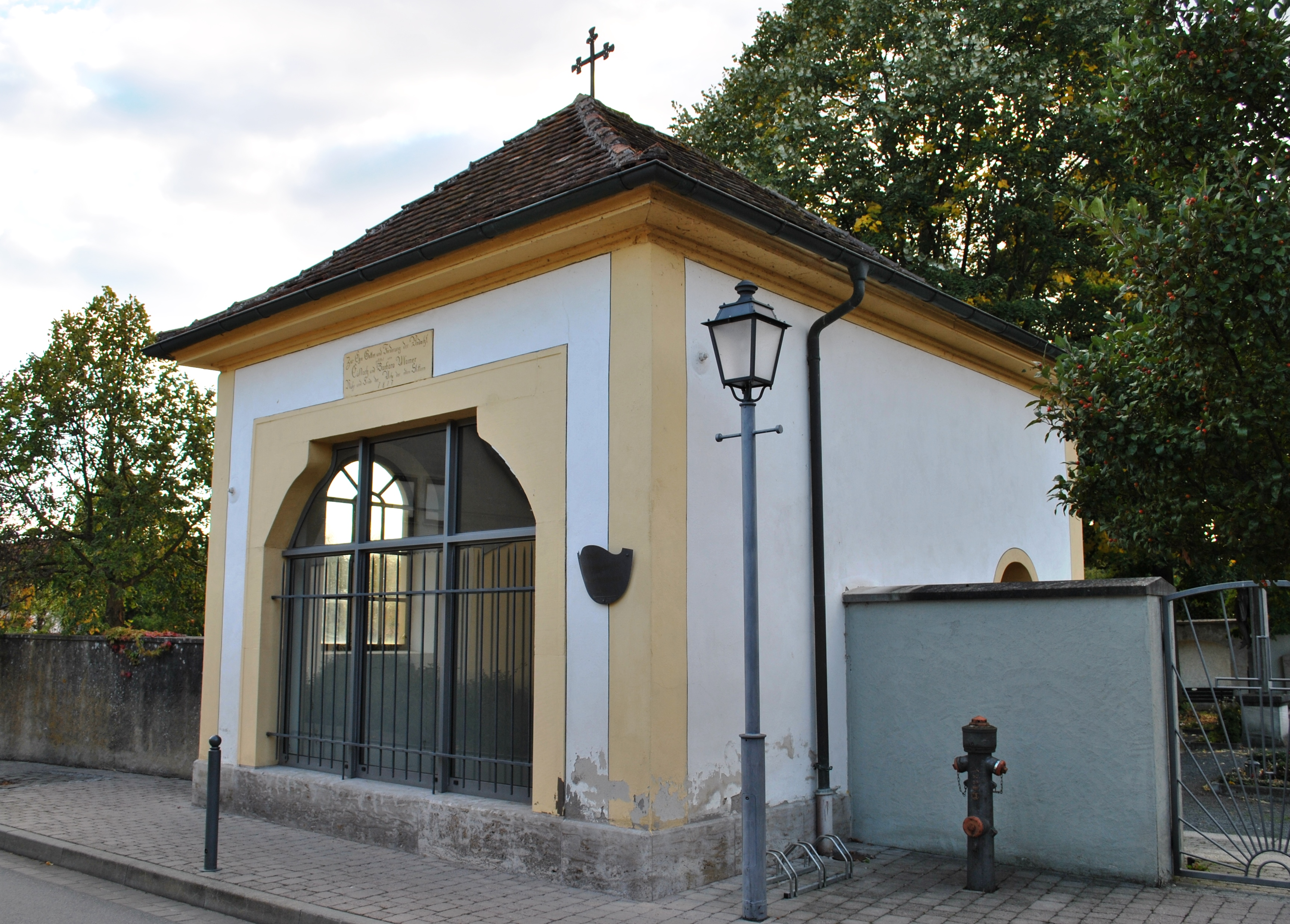 Friedhofskapelle Sommerach, Bau des 17. Jahrhunderts, 1835 Abriss und Neubau bis 1836, beinhaltet die sogenannte Graue MarterThis is a photograph of an architectural monument.